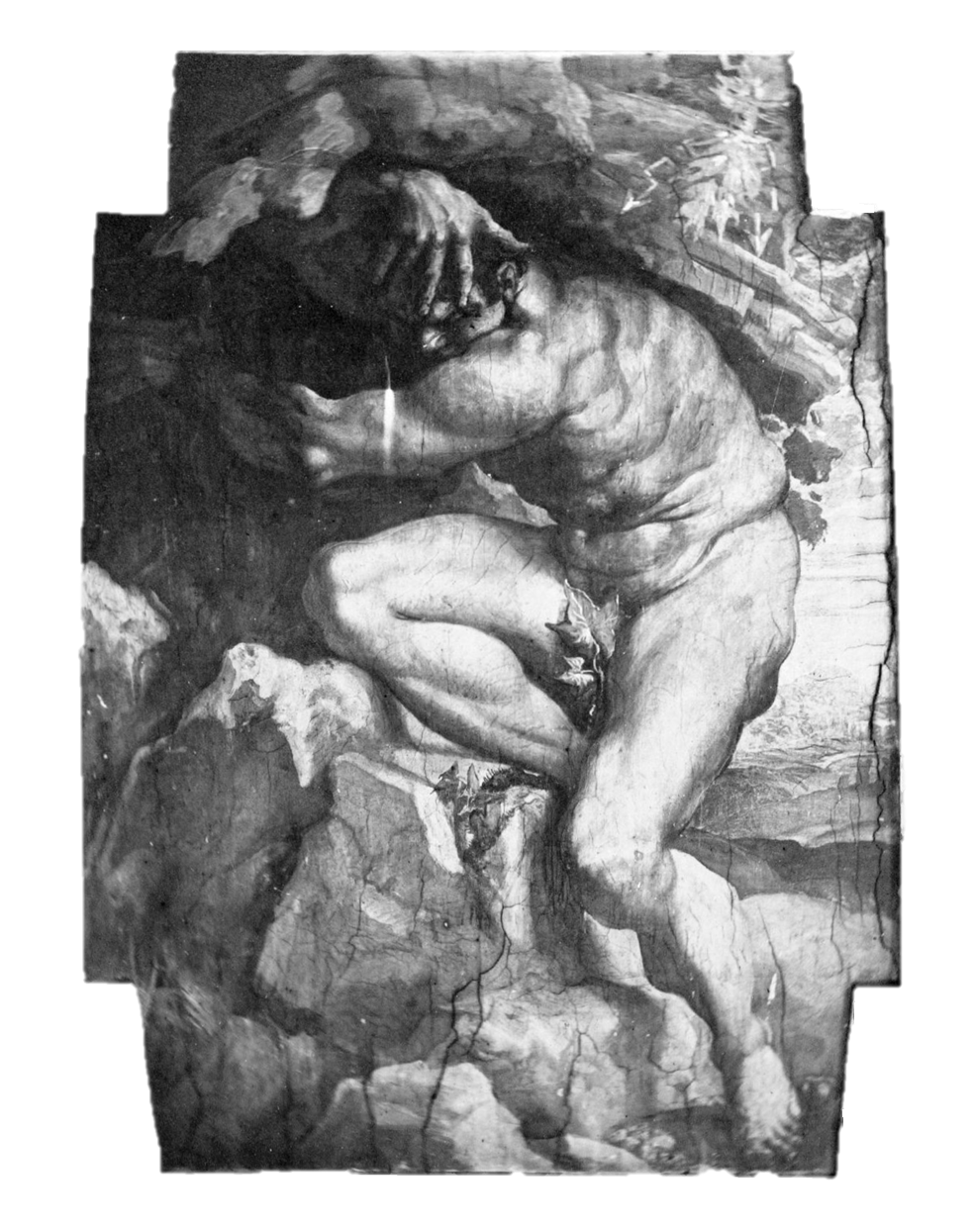 Encelado